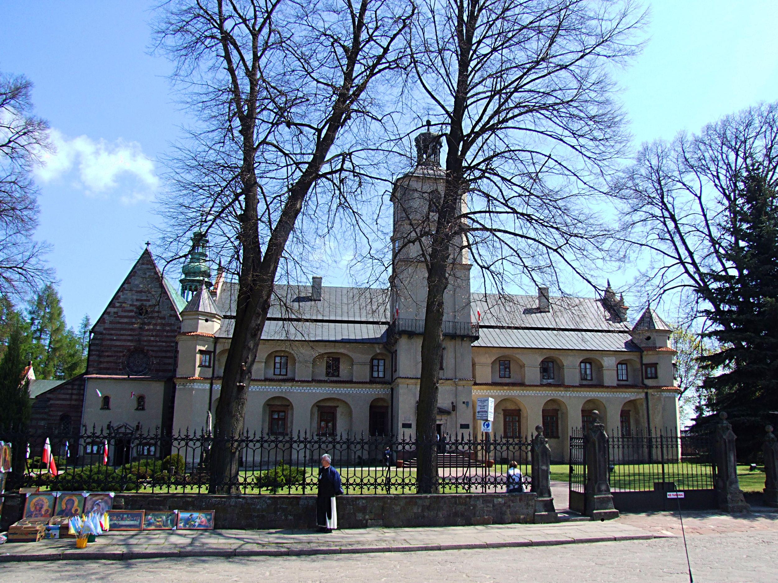 Wąchock - Romański kościół klasztorny pw. Najświętszej Marii Panny i św. Floriana